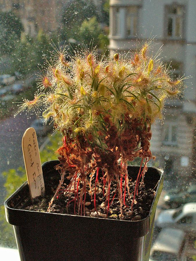 Drosera scorpioides 'Giant' in cultivation